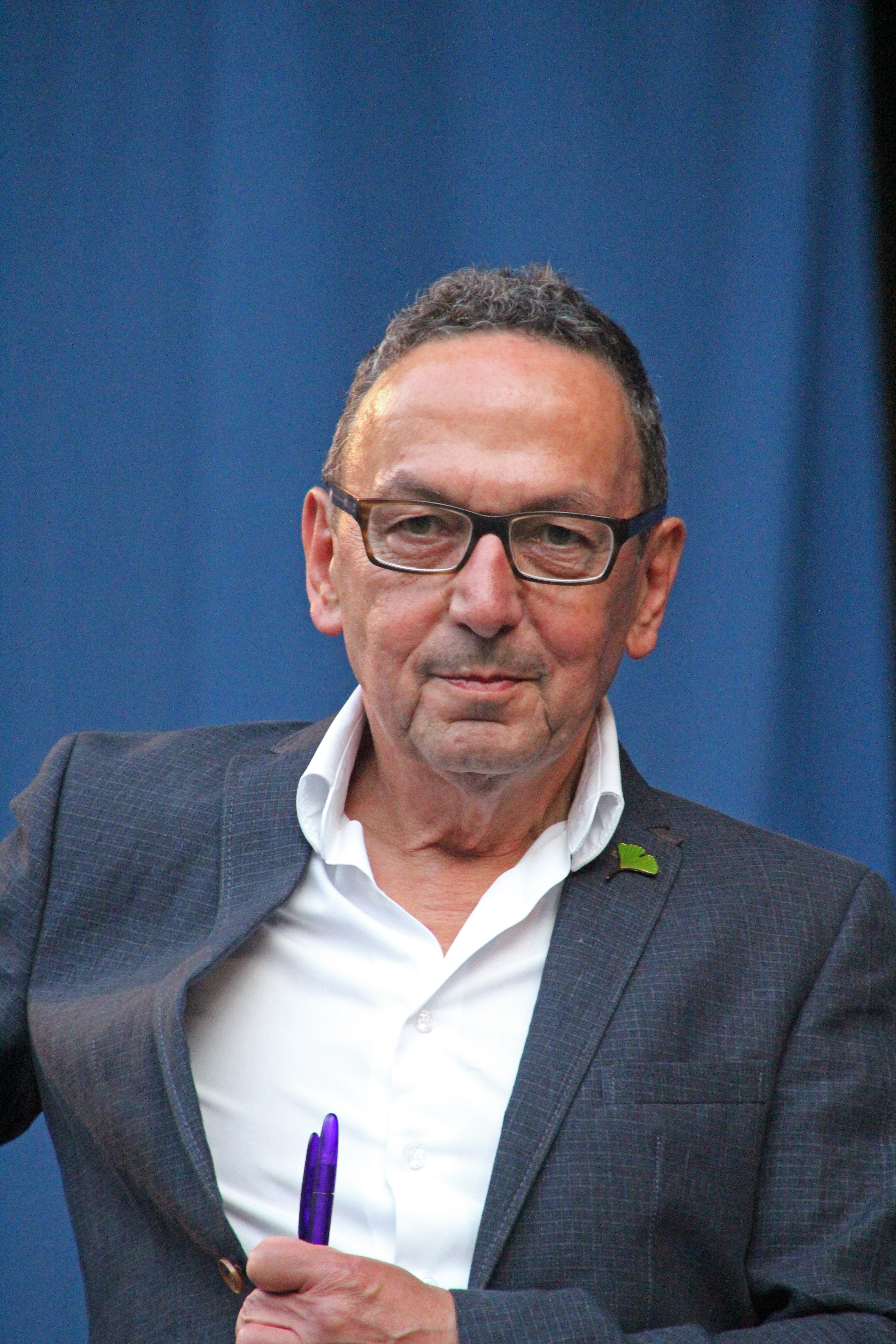 Bildinhalt: Der Direktor des Frankfurter Palmengartens Matthias Jenny begrüßt die Besucher bei Jazz im Palmengarten. Aufnahmeort: Frankfurt am Main, Deutschland Die dargestellte Person wurde bei einem öffentlichen Auftritt fotografiert.